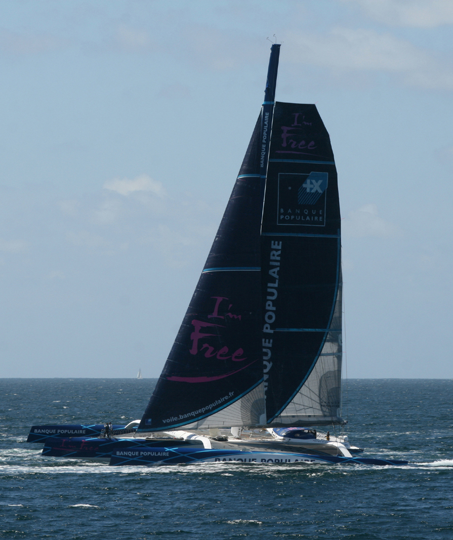 Même image que Volvo Ocean Race - Banque Populaire V (1).JPG recadré sur lez trimarann Banque Populaire V